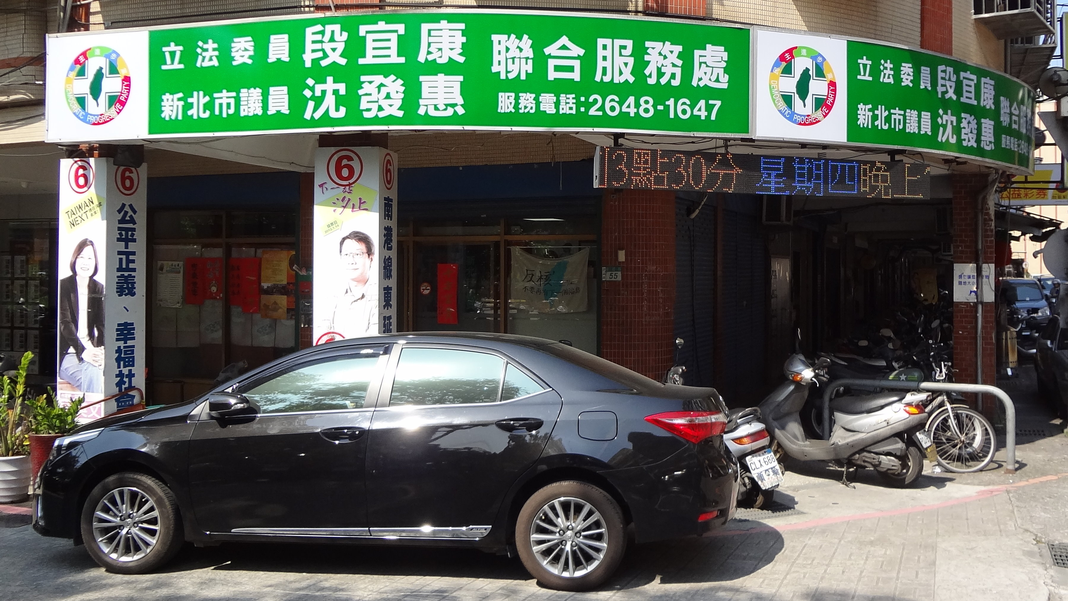 民主進步黨立法委員段宜康與新北市議員沈發惠聯合服務處，位於新北市汐止區新昌路55號1樓，左方樑柱保留2012年民主進步黨總統候選人蔡英文及立法委員候選人沈發惠平面廣告。